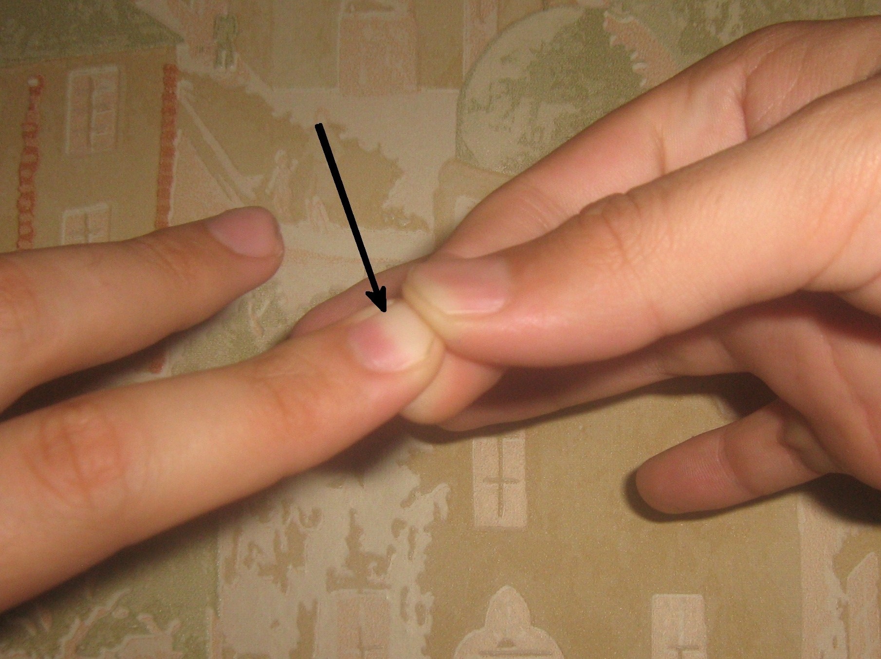 Один из методов выявления капиллярного пульса